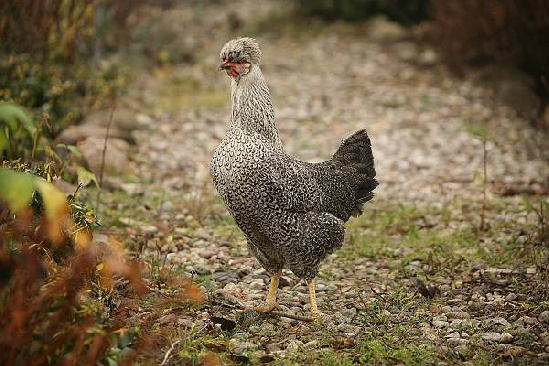 Чубатая 1